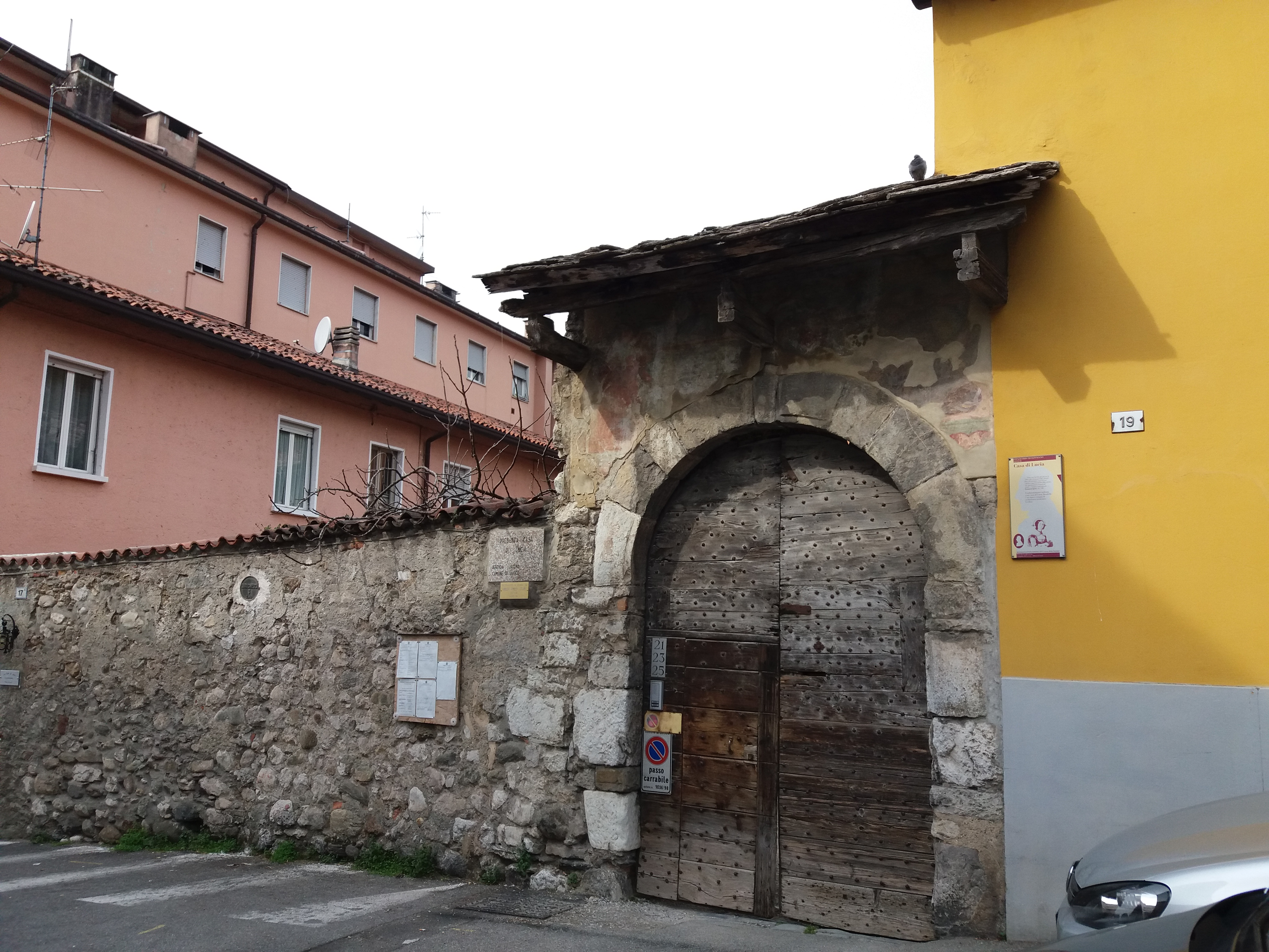 In questa foto è raffigurato il portone della presunta casa di Lucia